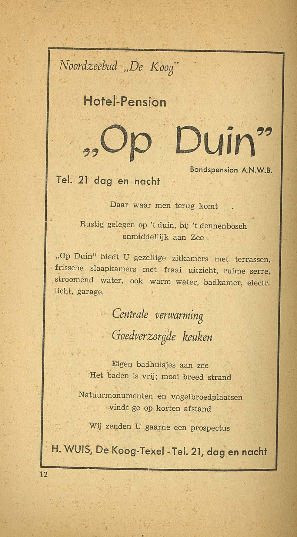 pagina uit de pensiongids 1947